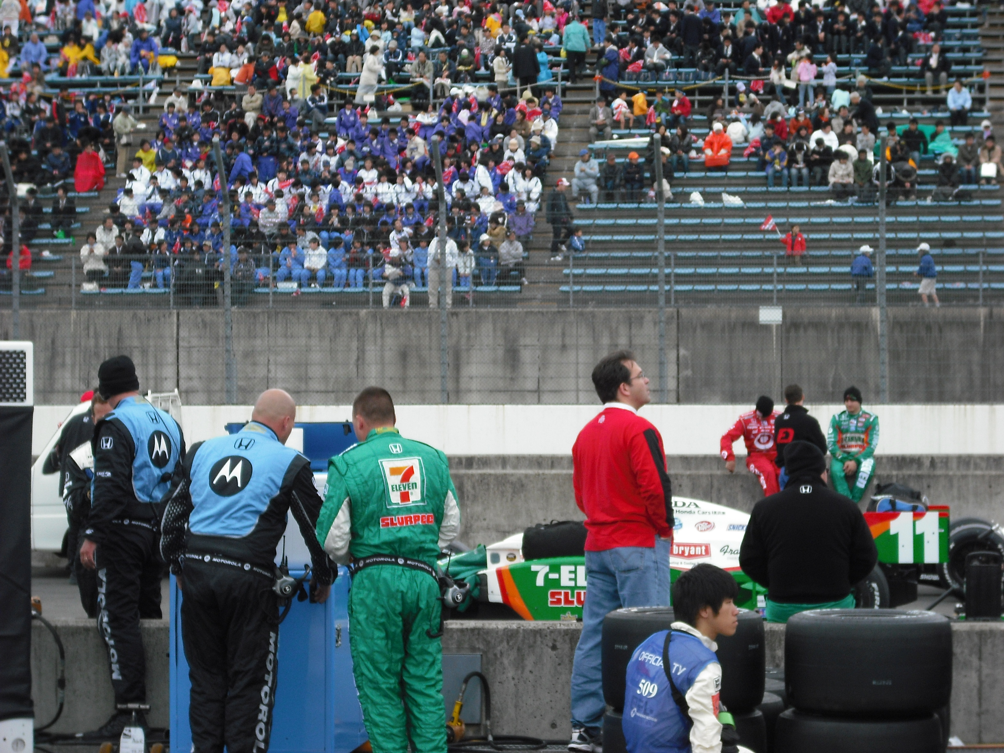 Starting grid at Indycar Motegi 2008